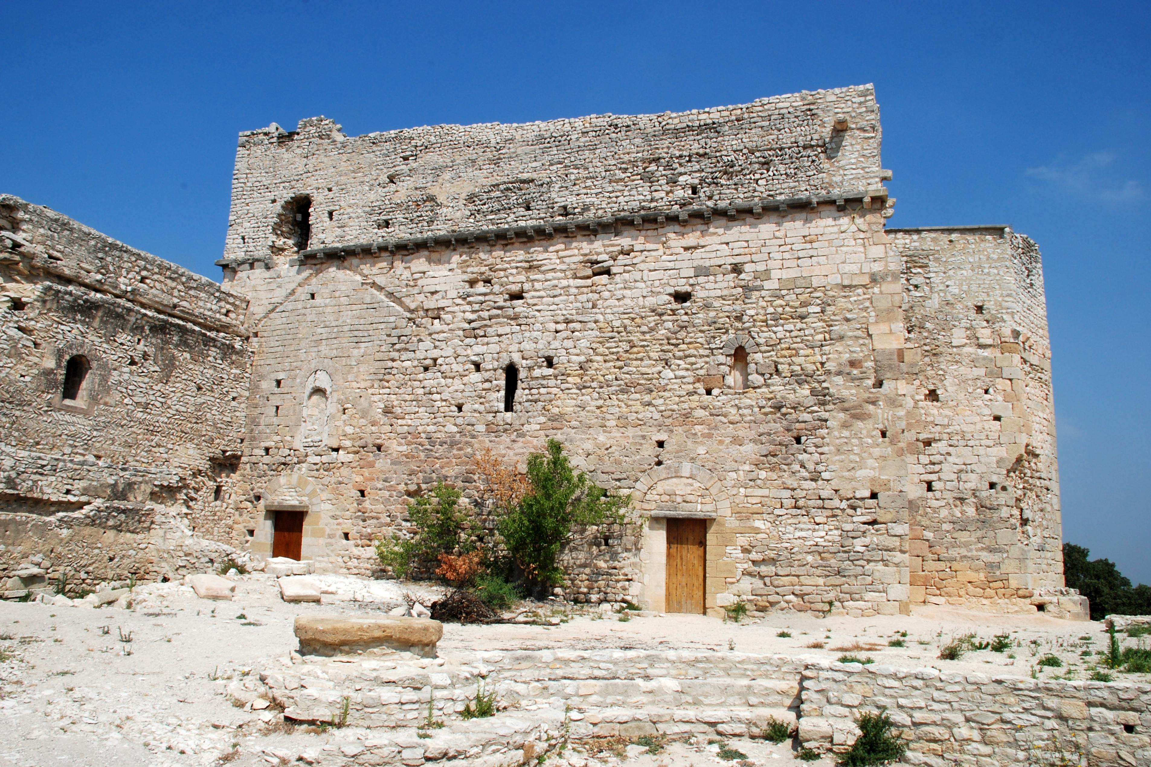 France - Provence - Vaucluse - Le Thor - Église Sainte-Marie de Thouzon